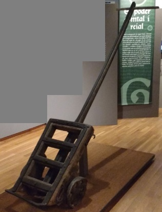 Carro de llança: utilitzada per transportar pedres Material: fusta i metall MHG